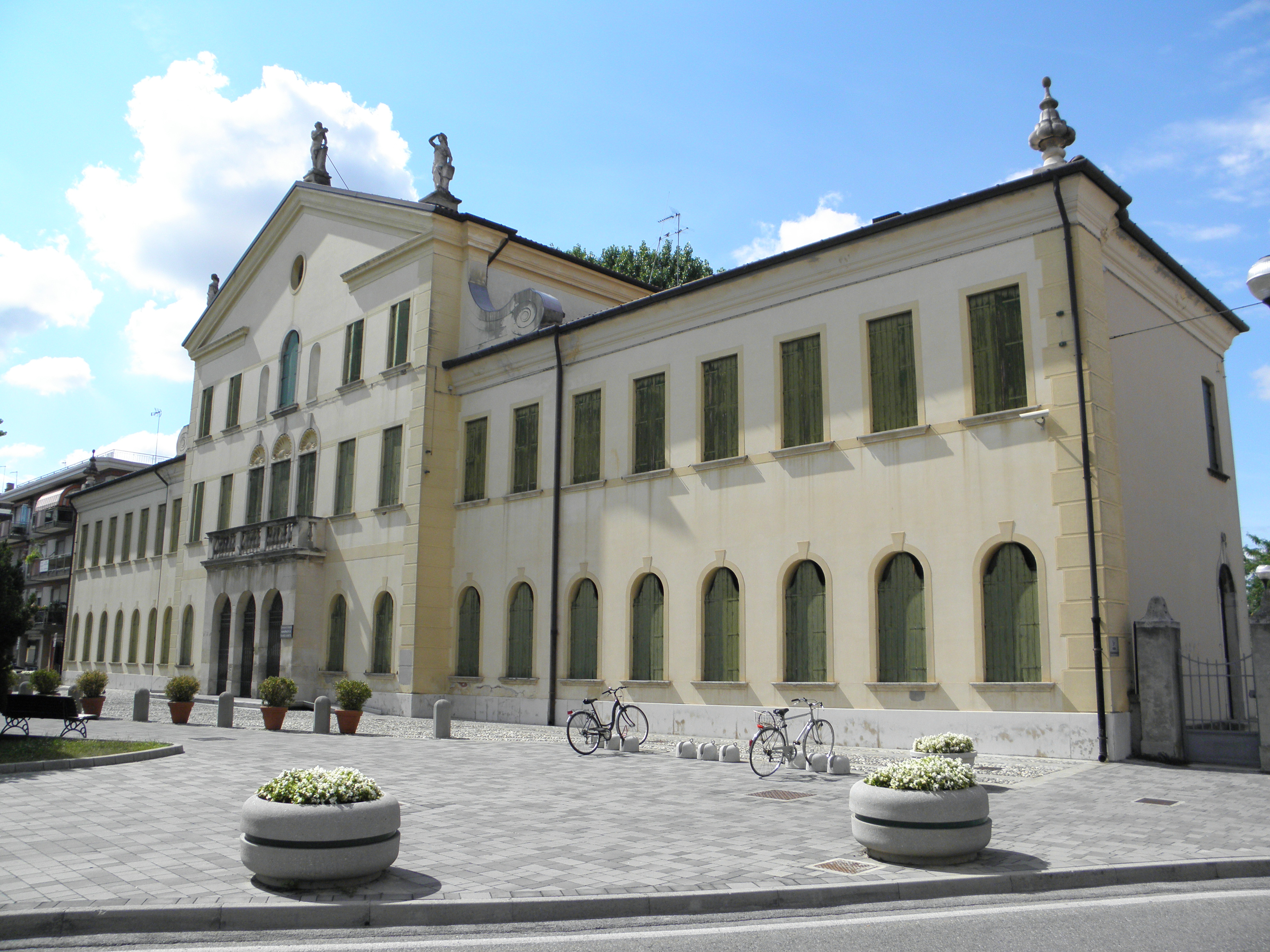 Favaro Veneto, frazione di Venezia nel tessuto urbano di Mestre: Piazza Pastrello e l'ex Palazzo Municipale.